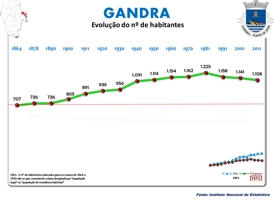 Cenos 1864/2011